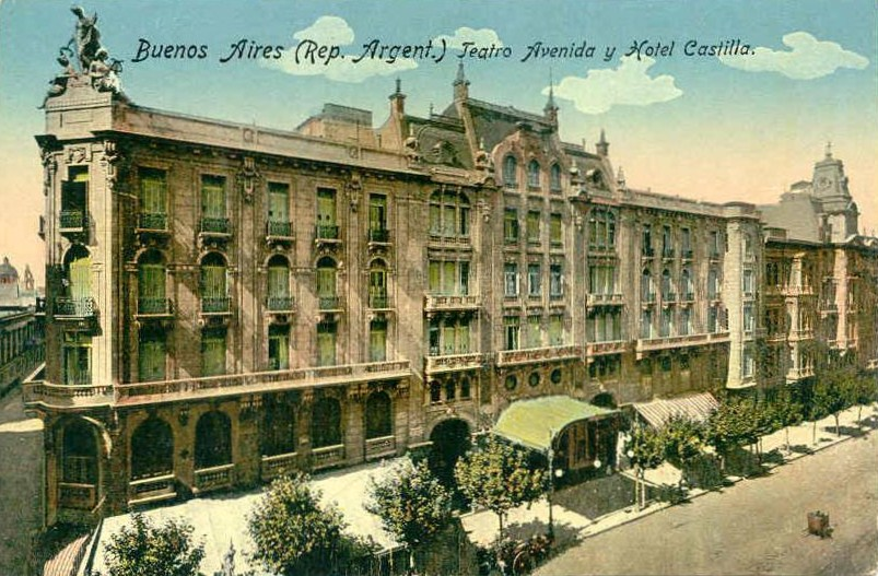 Vista de Avenida de Mayo desde el Hotel París: Se ve la esquina con la calle Salta, el Hotel Castilla y el Teatro Avenida, incendiado en 1979 y reinaugurado en 1993 con una reconstrucción parcial.